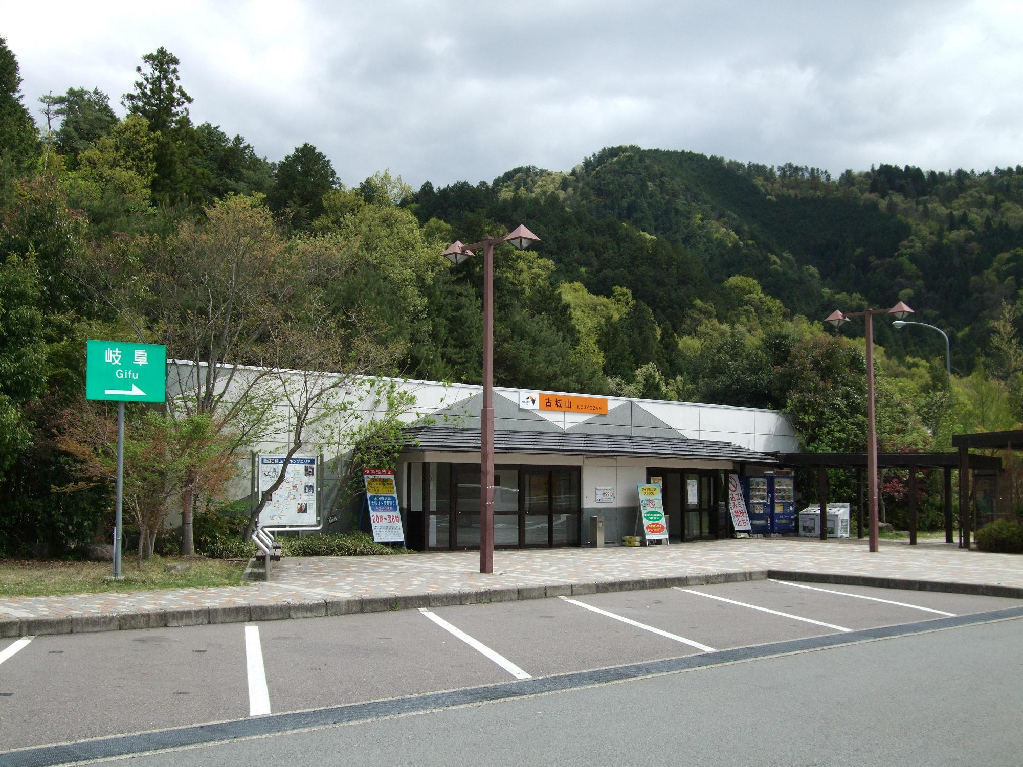 東海北陸自動車道 古城山パーキングエリア 2008.4.19 投稿者が撮影